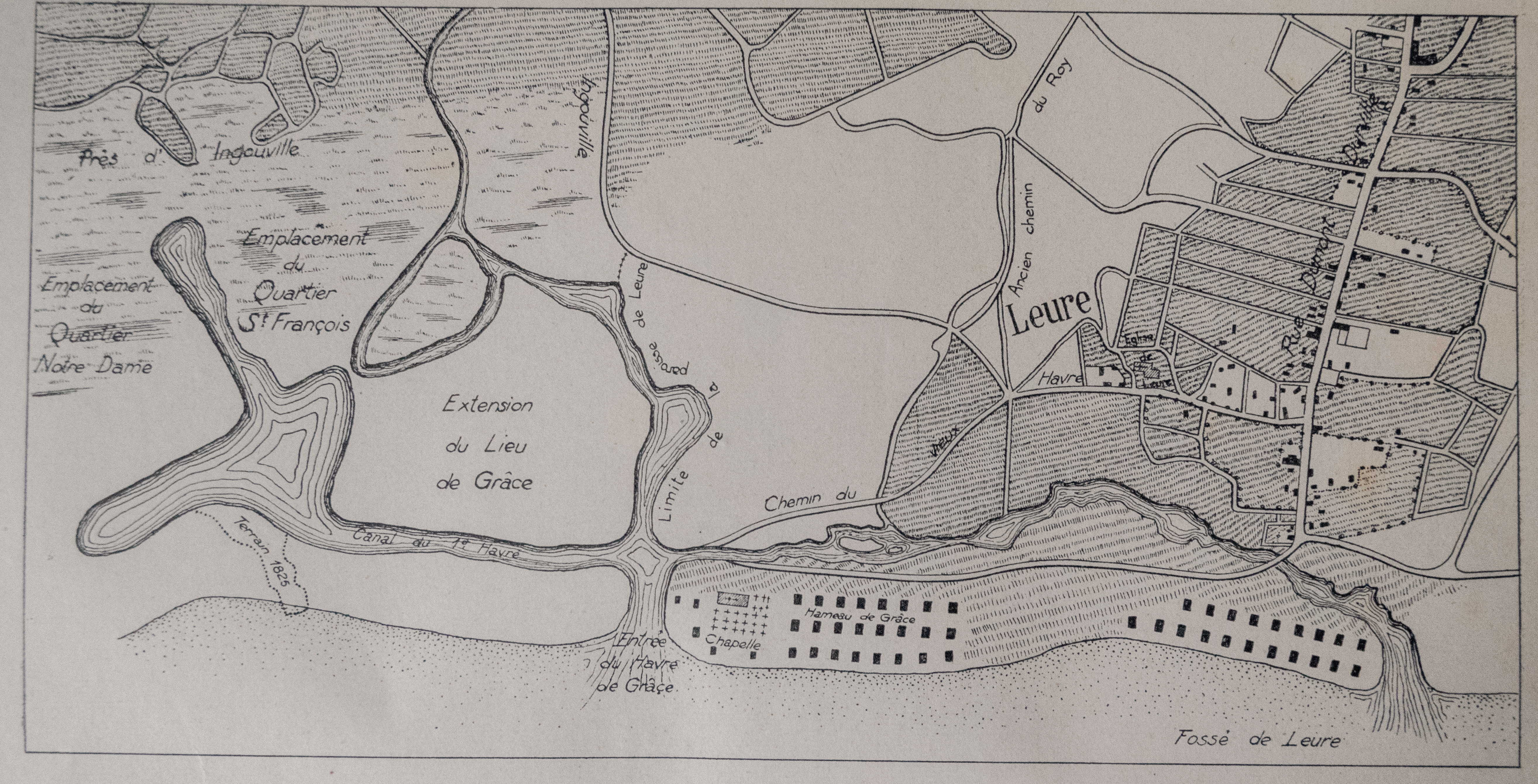 Plan du village de Leure, et le "Hameau de Grâce" et son "havre", ainsi que les marais à l'ouest qui s'appellent "lieu de Grâce". Emplacement de la chapelle Notre-Dame-de-Grâce et son cimetière.